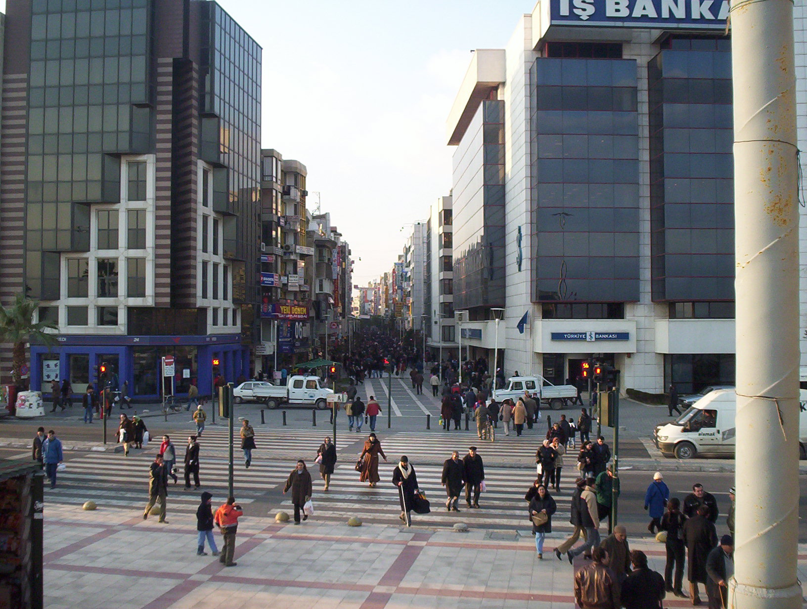 tr: Karşıyaka Çarşı Sokağı, Karşıyaka, İzmir, Türkiye en: Karşıyaka Bazaar Street, Karşıyaka, İzmir, Turkey es: Calle Bazar del Karşıyaka, İzmir, Turquía